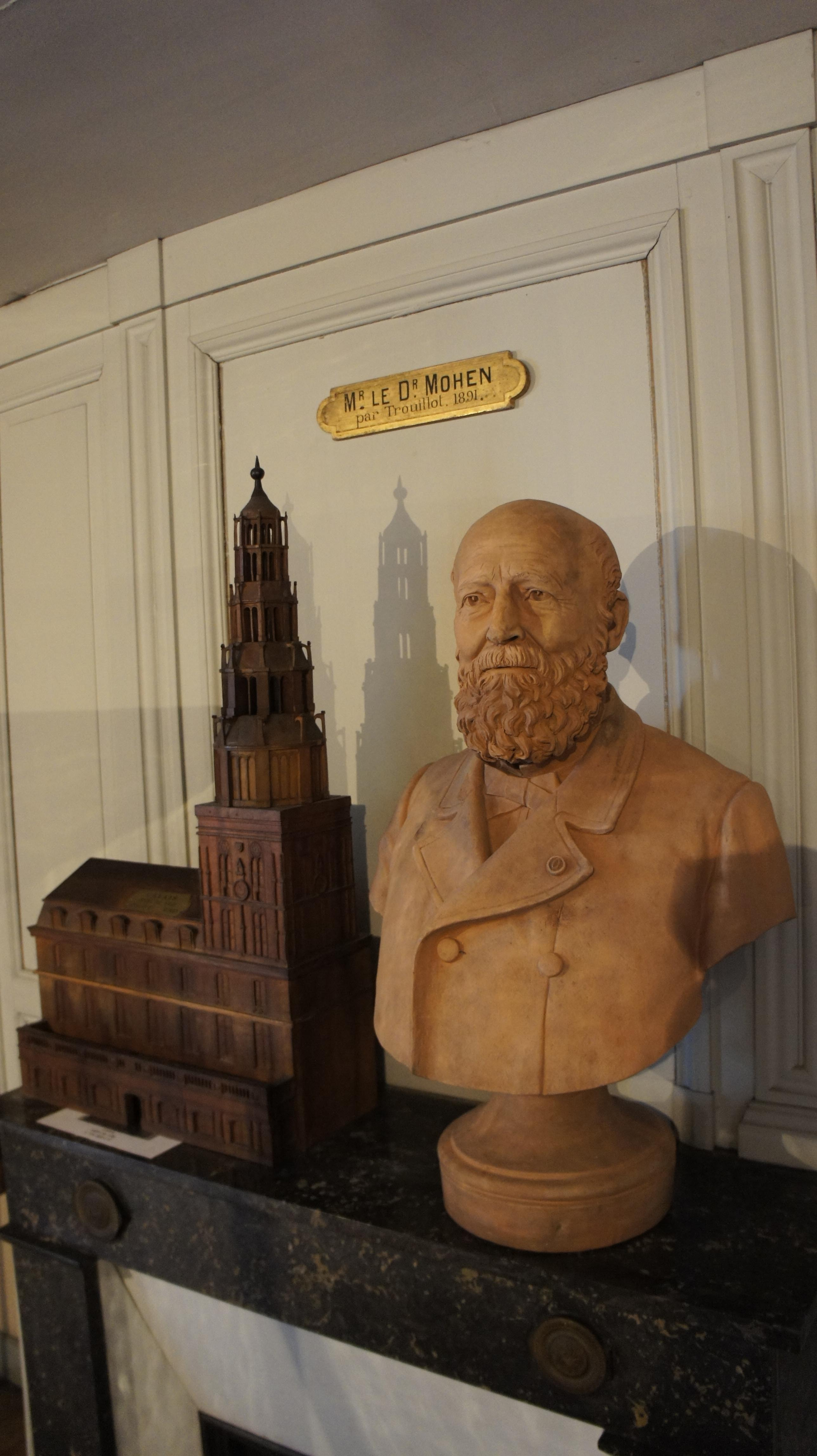 Buste de M. Le Doyen et d'une pièce de sa collection de miniatures au musée Garinet.